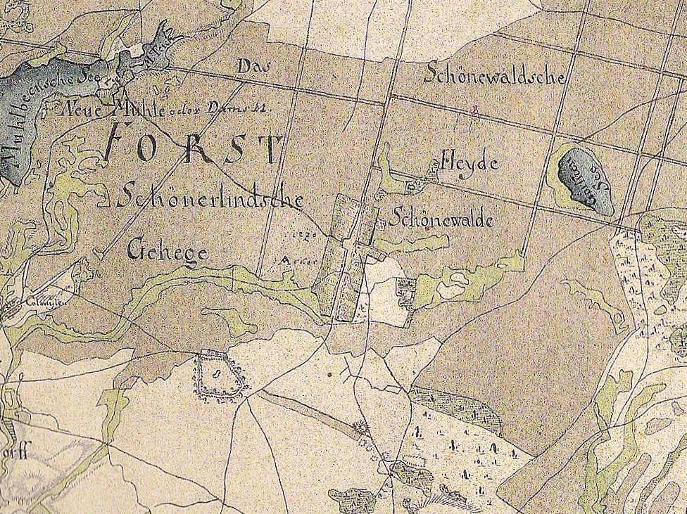 Karte der Umgebung von Schönwalde in den Jahren 1767 bis 1787, Land Brandenburg, Deutschland